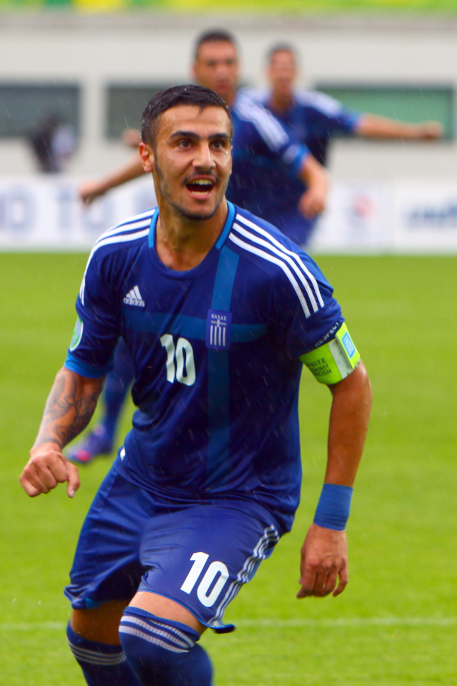 Giorgios Katidis en 2012